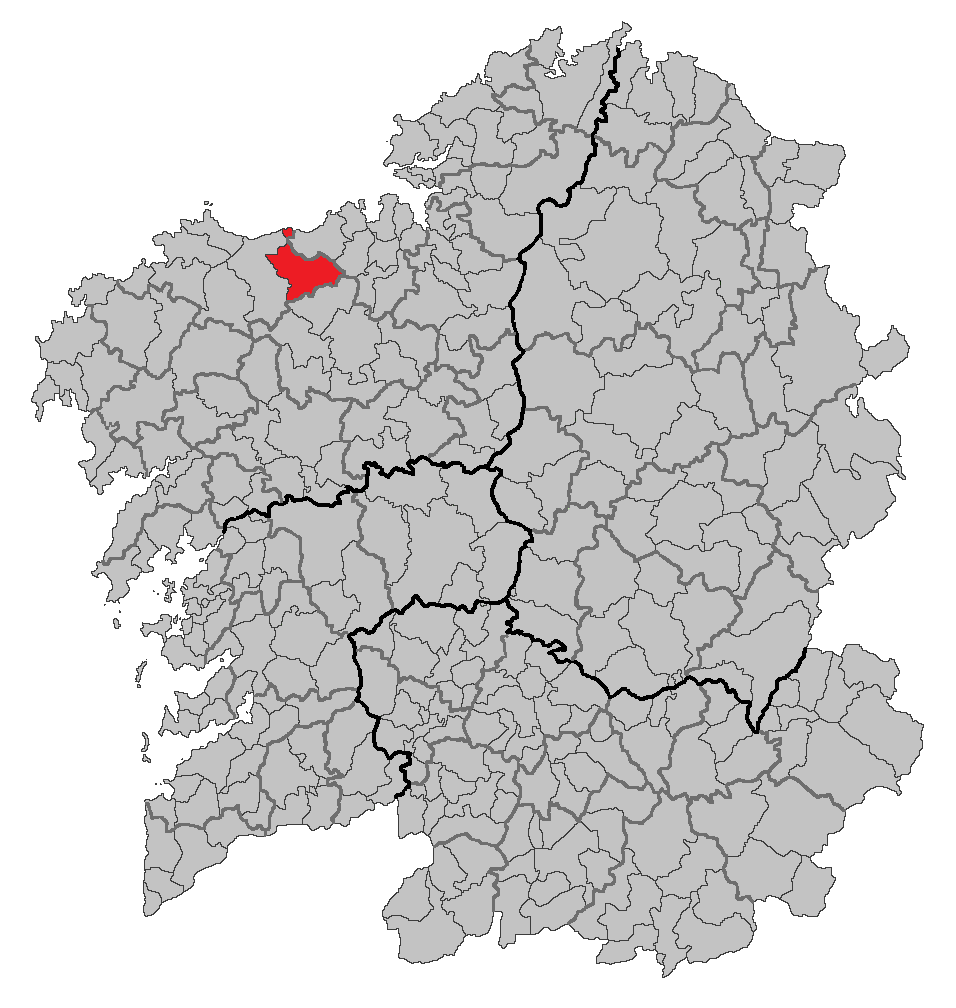 Mapa coa localización do concello de A Laracha.